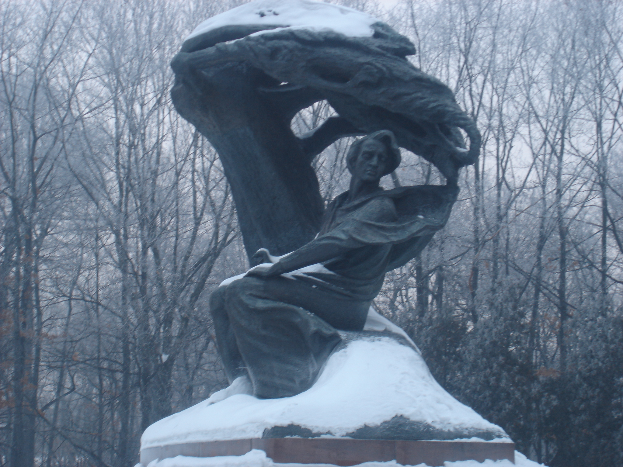 Monumento a Frederic Chopin, emplazado en el parque Lazienki de Varsovia en 1926. A sus pies se celebran conciertos con su música durante el buen tiempo.